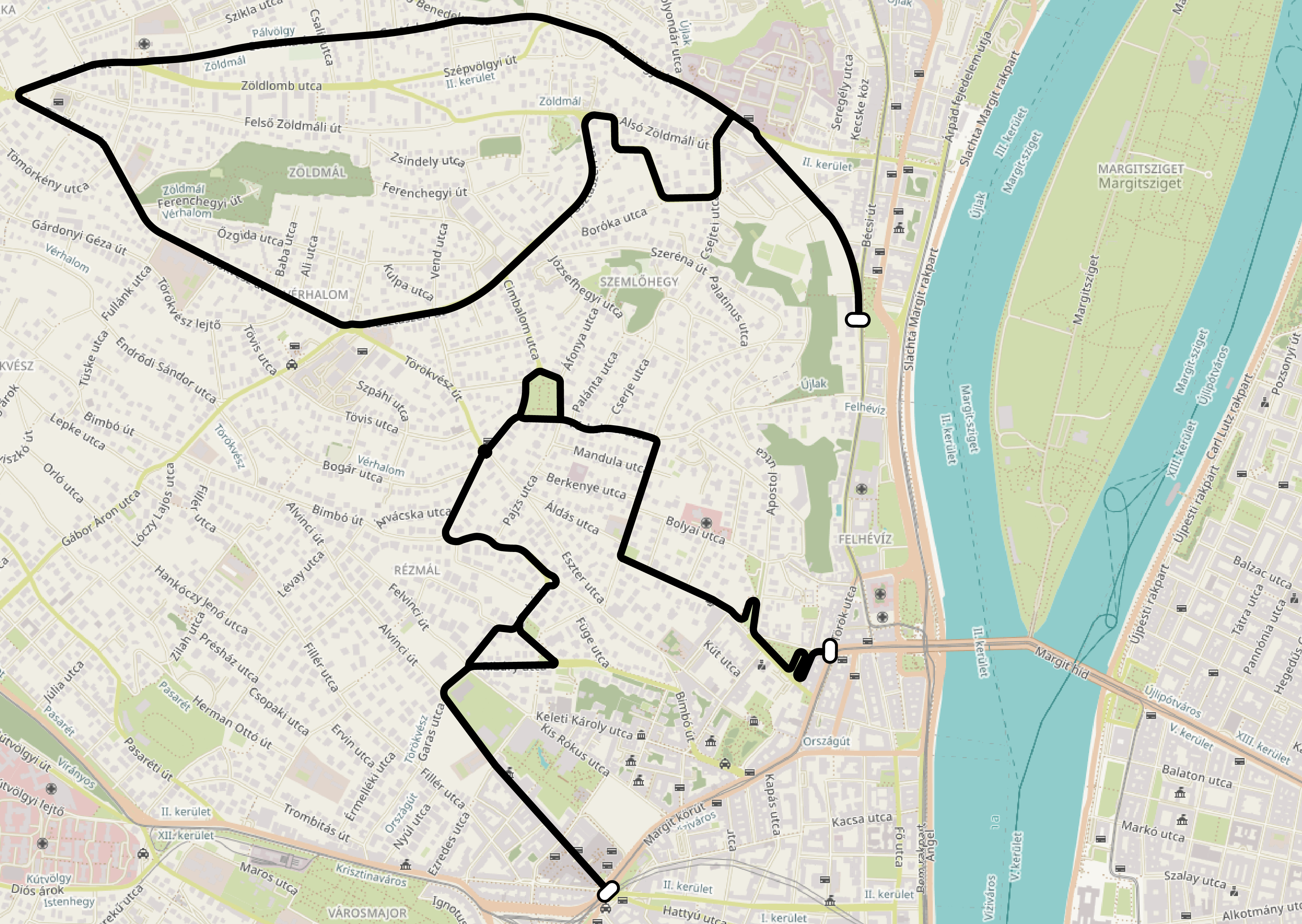 Az 1946-ban megtervezett trolibuszhálózat észak-budai része. This map may be incomplete, and may contain errors. Don't rely solely on it for navigation.